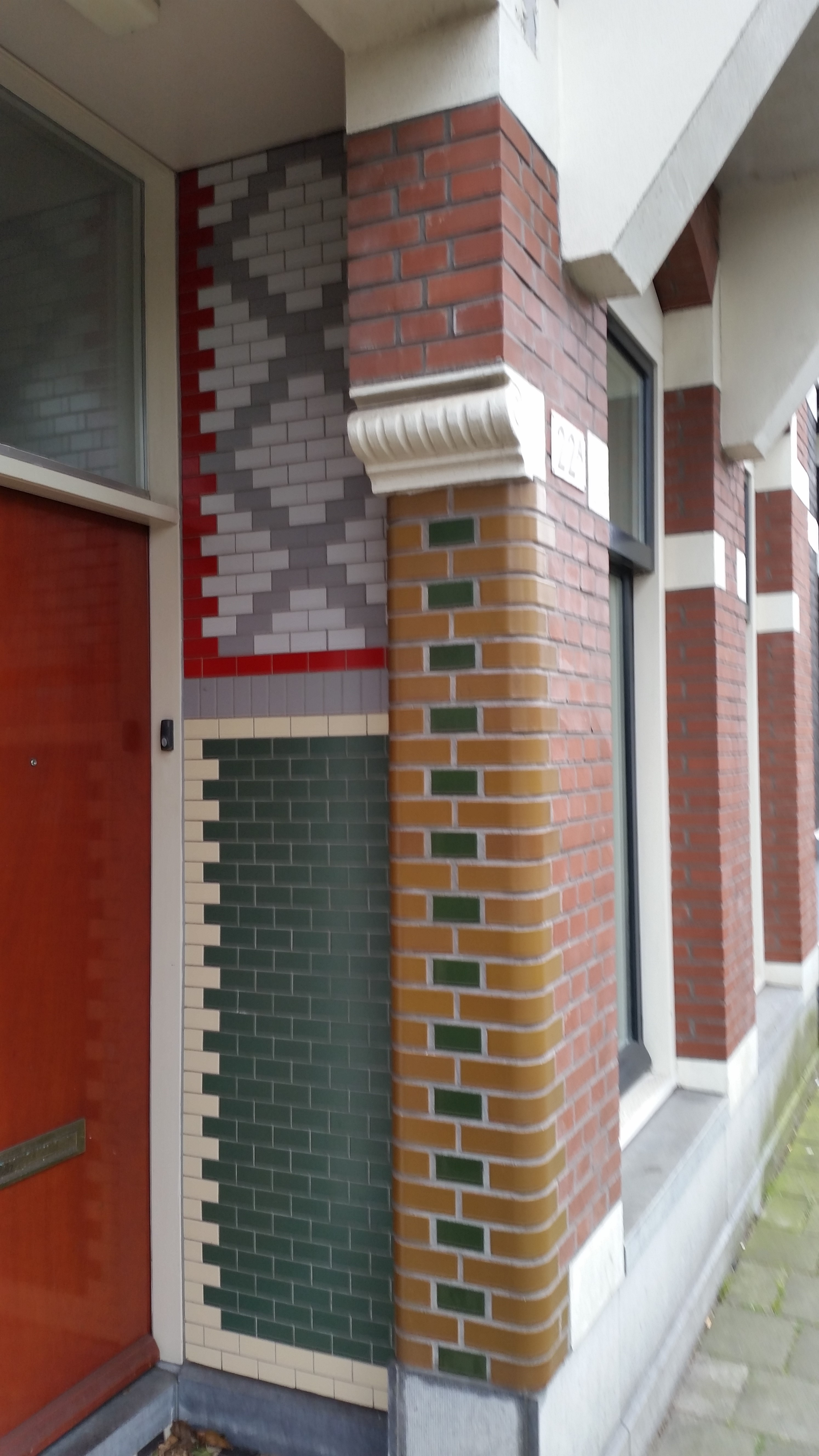 Impressie van de Oosterpark als straat in Amsterdam-Oost. (februari 2020)